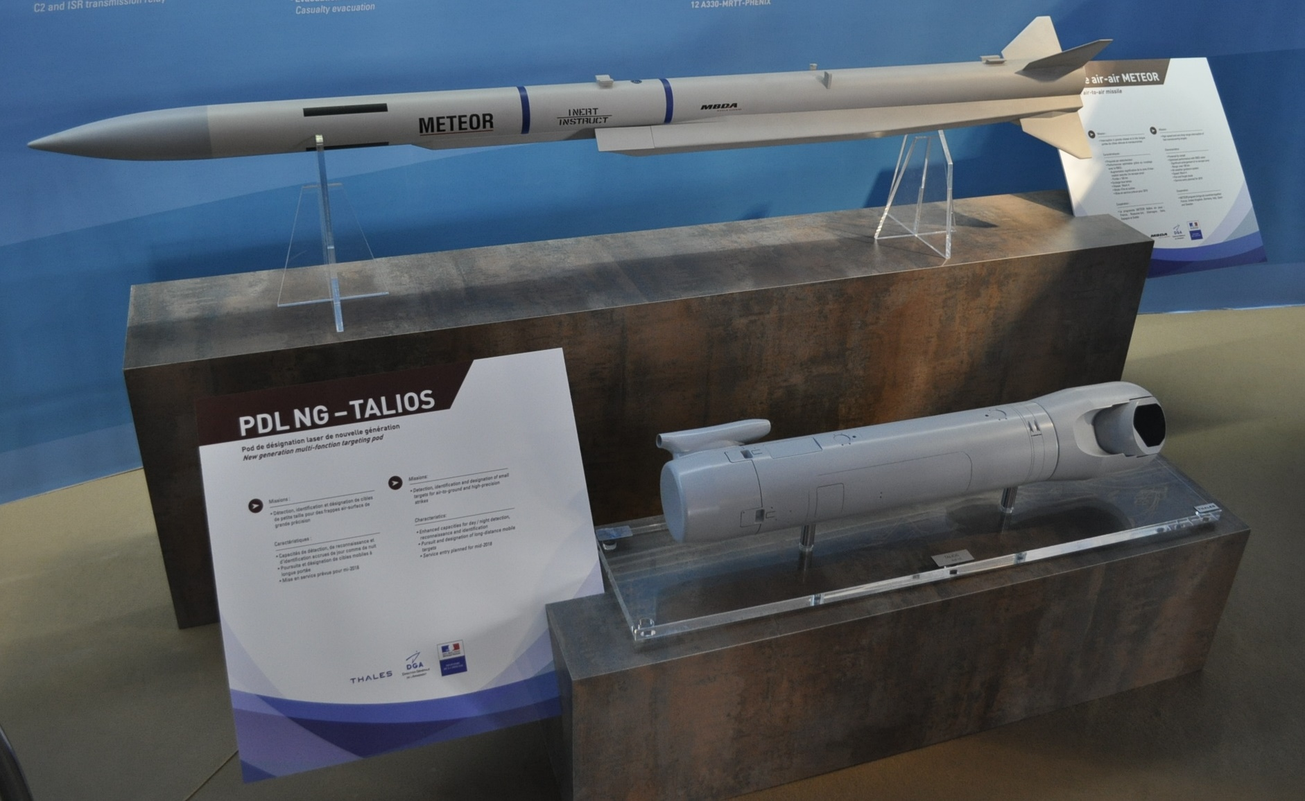 Maquettes du missile MBDA Meteor et de la nacelle de désignation Thales Talios, exposées au stand du ministère de la Défense au salon du Bourget 2015, pour présenter le standard F3R de l'avion Dassault Rafale.